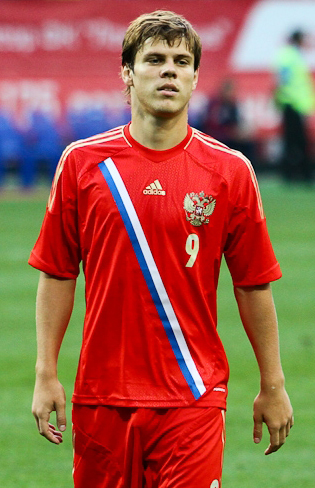 Александр Кокорин